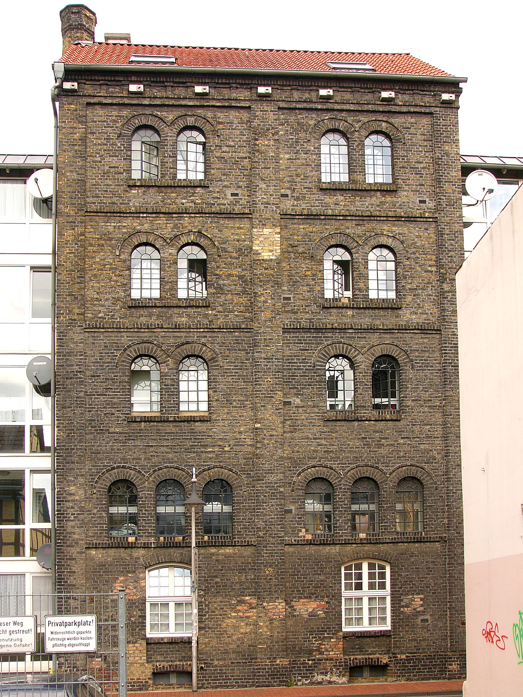 Brennereiturm der Hefefabrik Asbeck This is a photograph of an architectural monument., no. 218